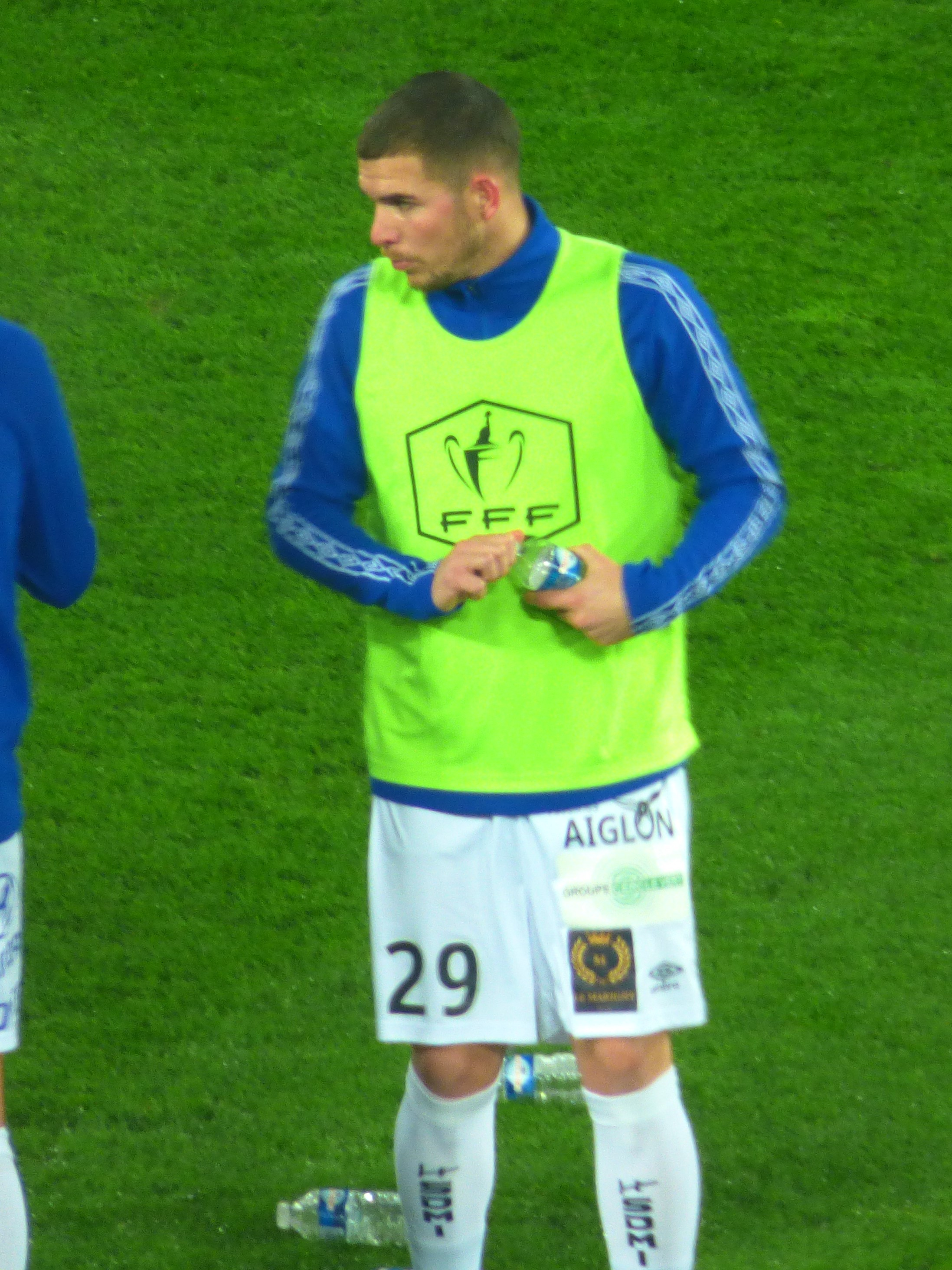 Maxence Derrien avant le match Lens - Chambly, comptant pour la dix-septième journée du championnat de France de football de Ligue 2 2019-2020, le 3 décembre 2019.